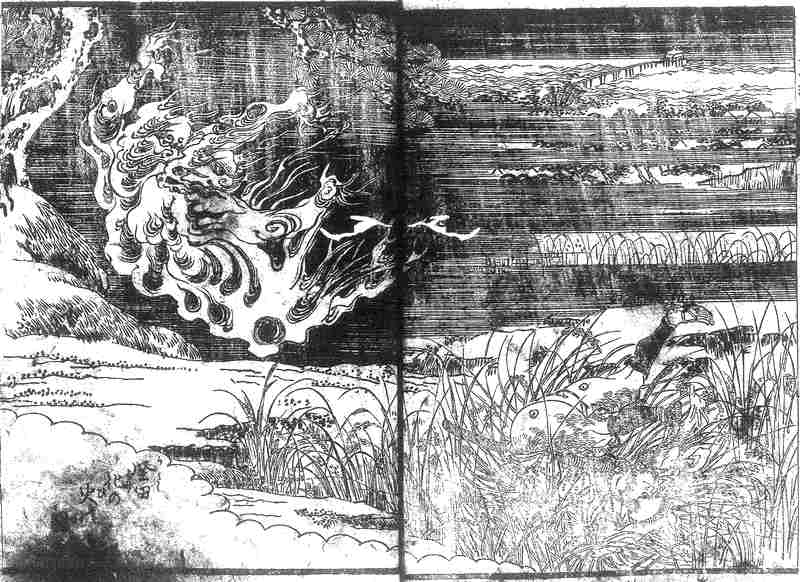 Bakebi (化け火)